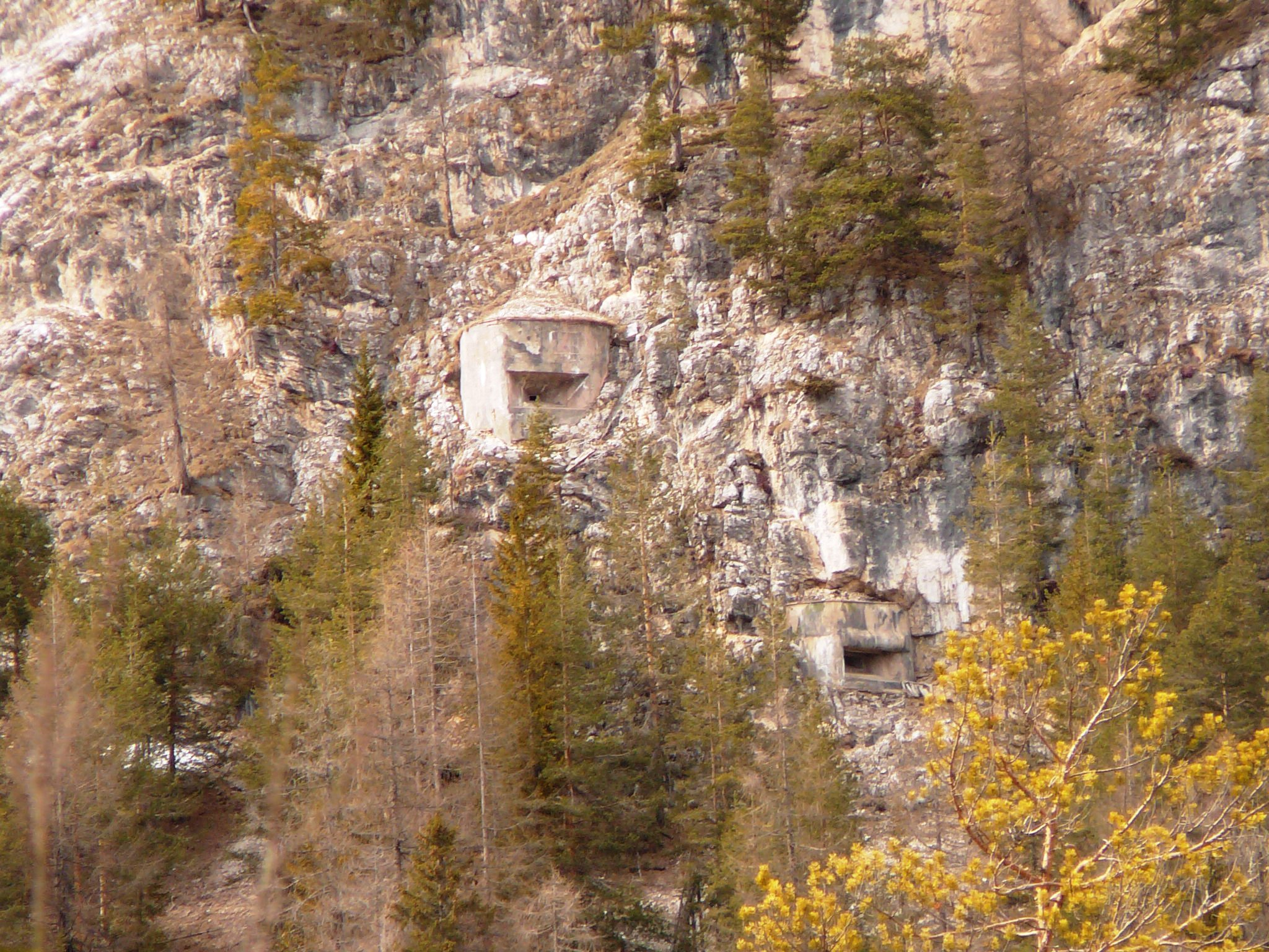 opera 4 cimabanche